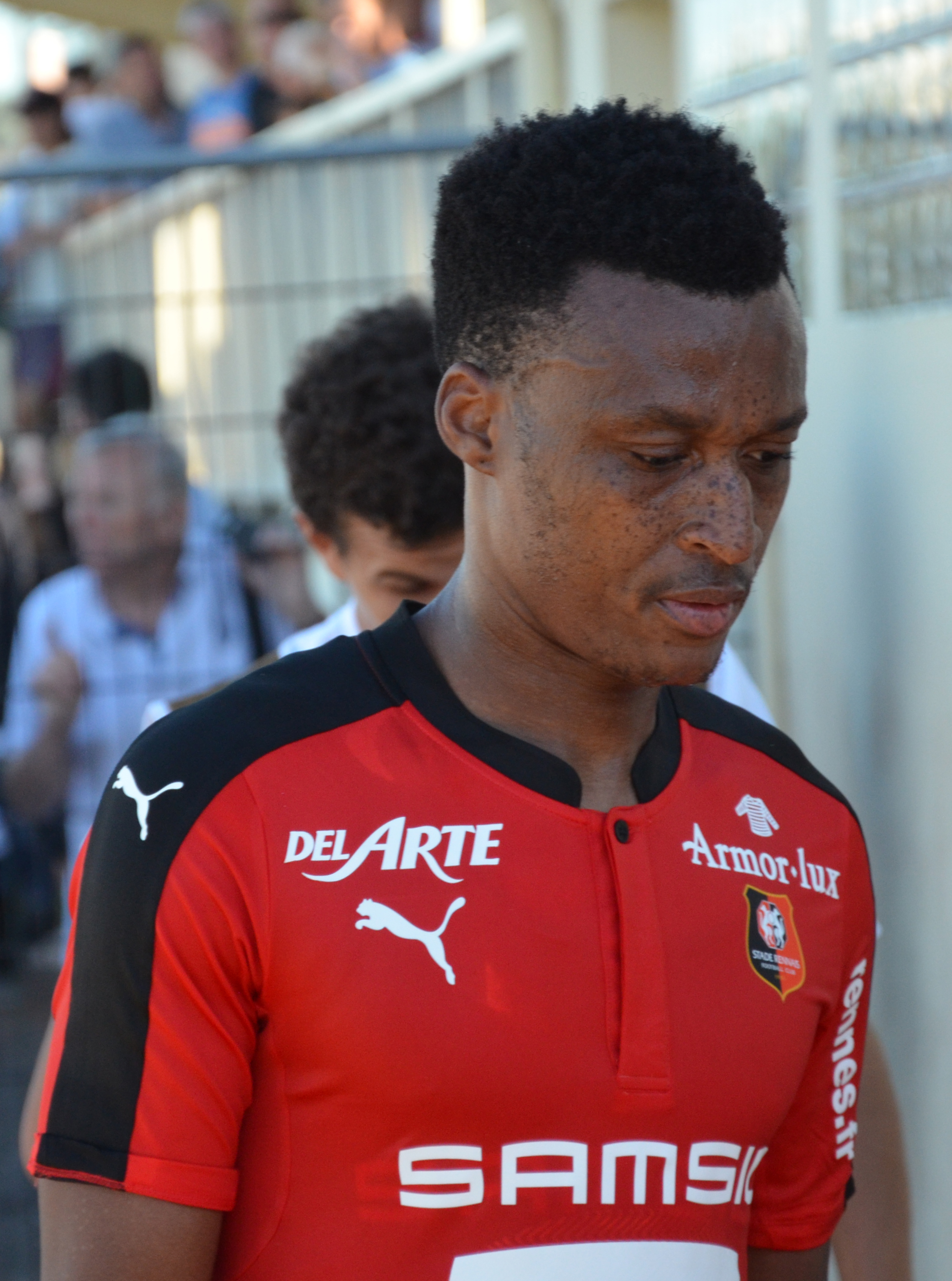 Photographie prise lors du match opposant le Stade rennais à l'USM Alger en match amical au stade Paul-Audrin de Dinard le 16 juillet 2016. Ici, Mexer.